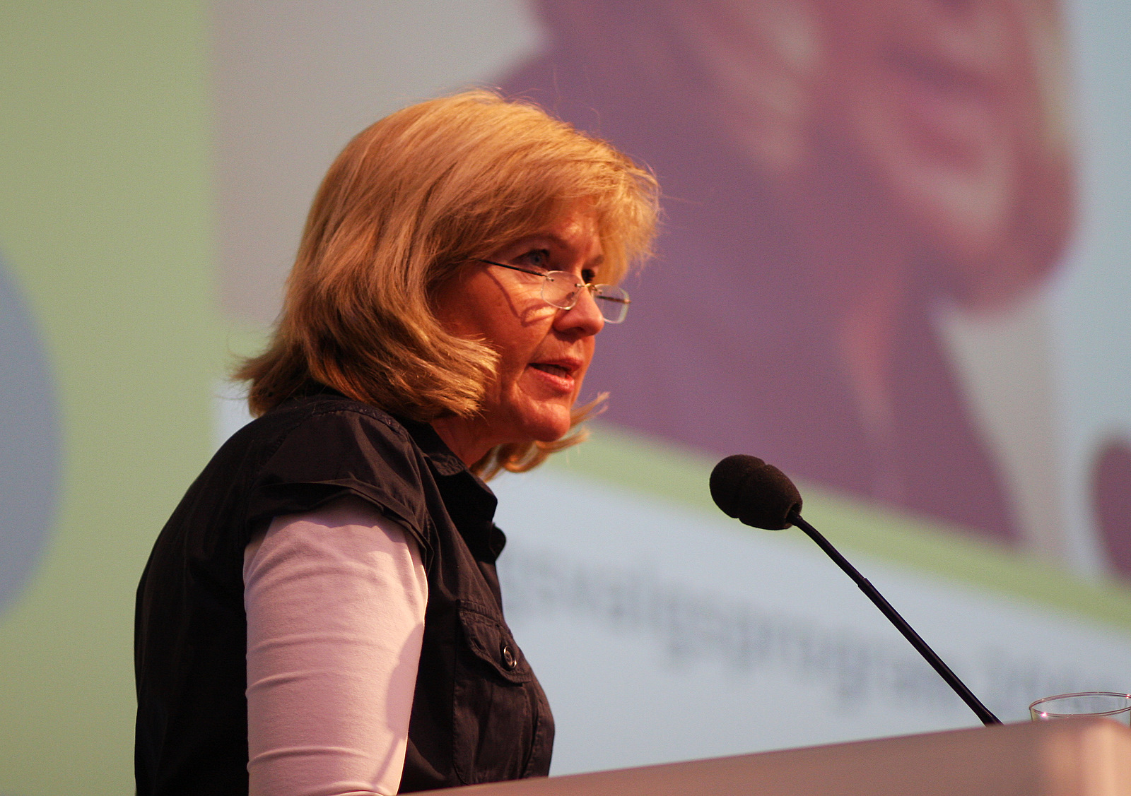 Borghild_Tenden på Venstres Landsmøte i Stavanger 2009